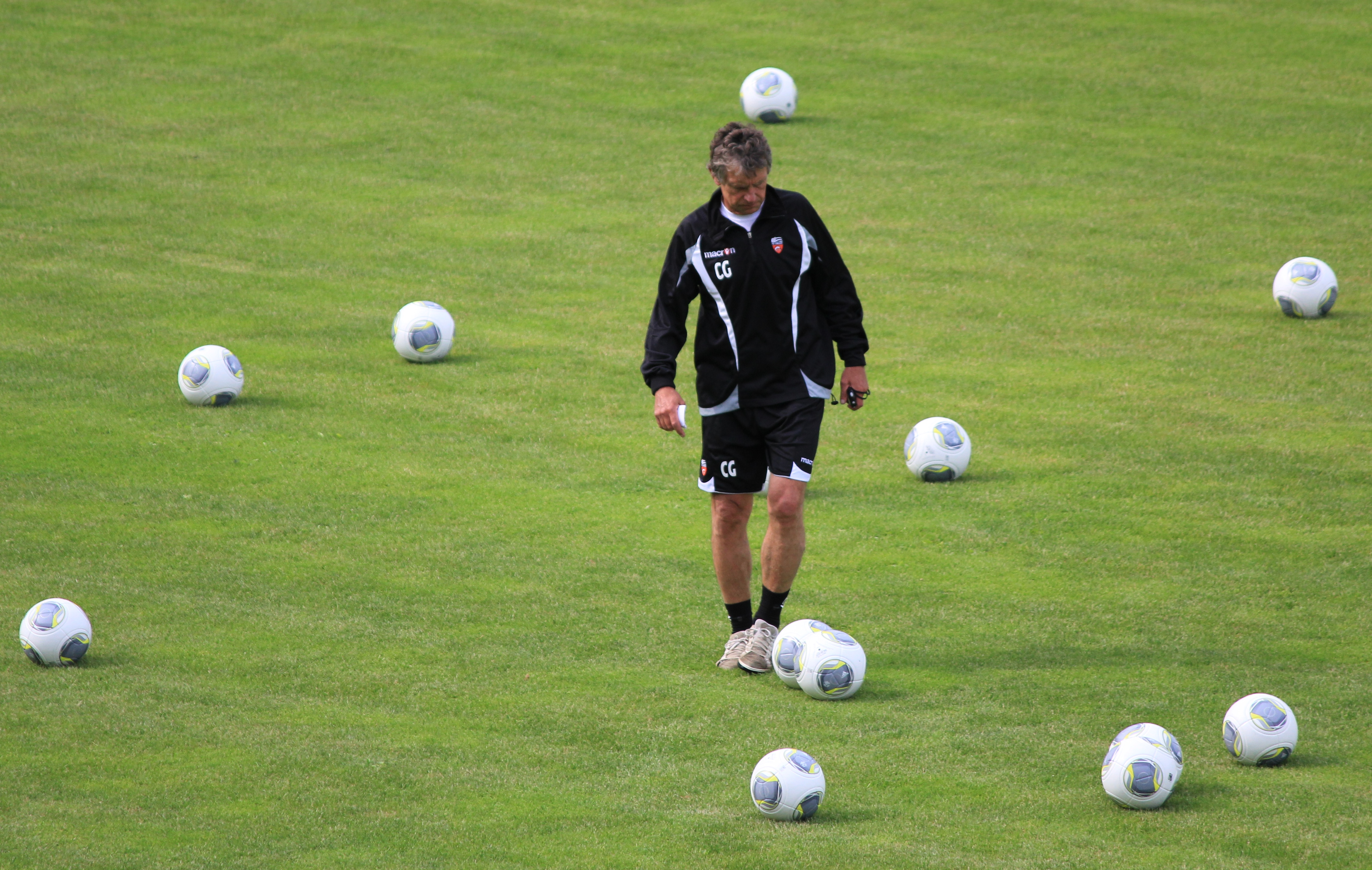 Christian Gourcuff lors de la reprise de l'entrainement du FC Lorient le 27 juin 2013